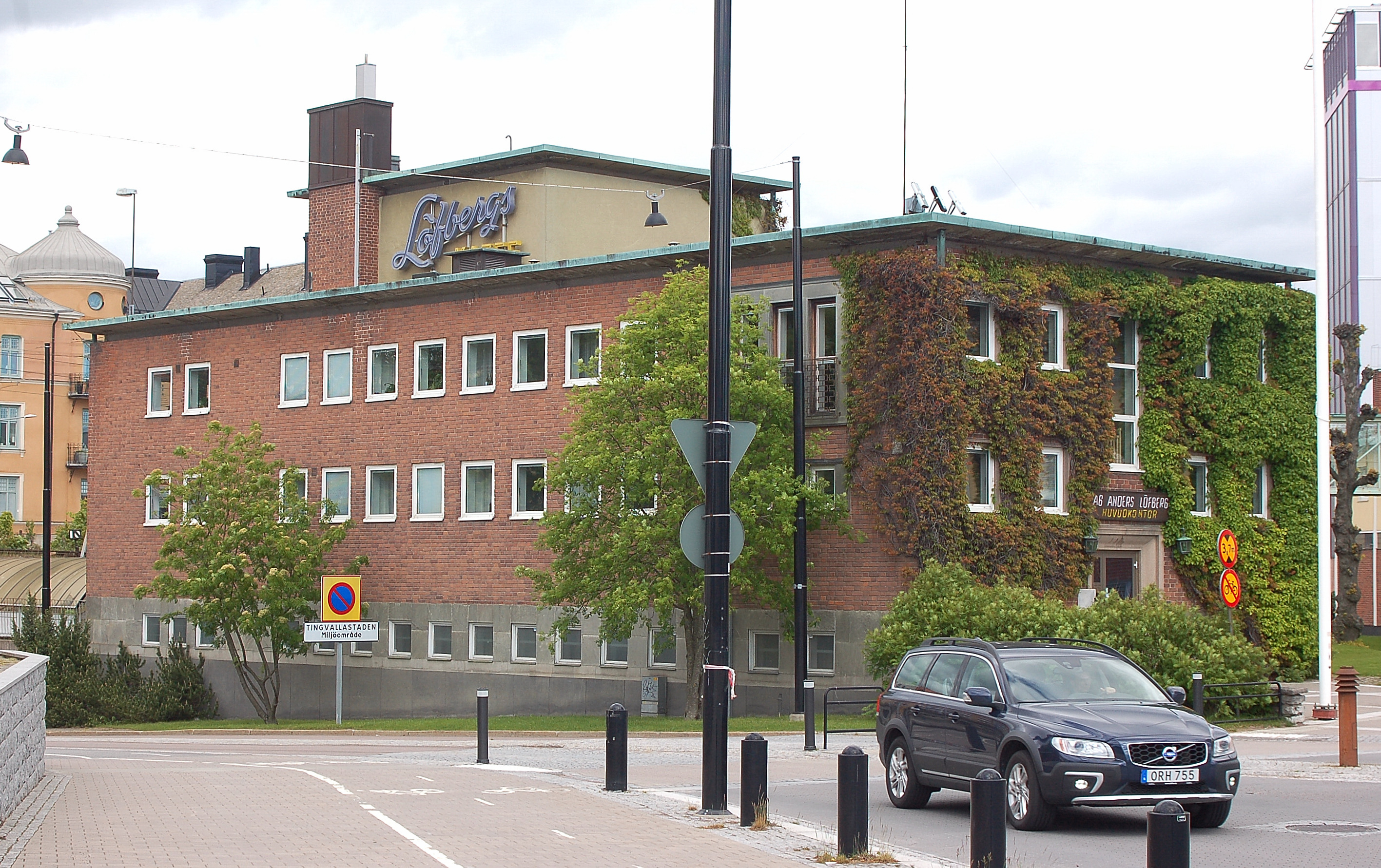 Löfbergs Huvudkontor i Viken, Karlstad. Byggår 1949, 1953 och 1960 (om- och tillbyggnad). Arkitekt: John Wästlunds Arkitektbyrå genom John Wästlund och Uno Asplund